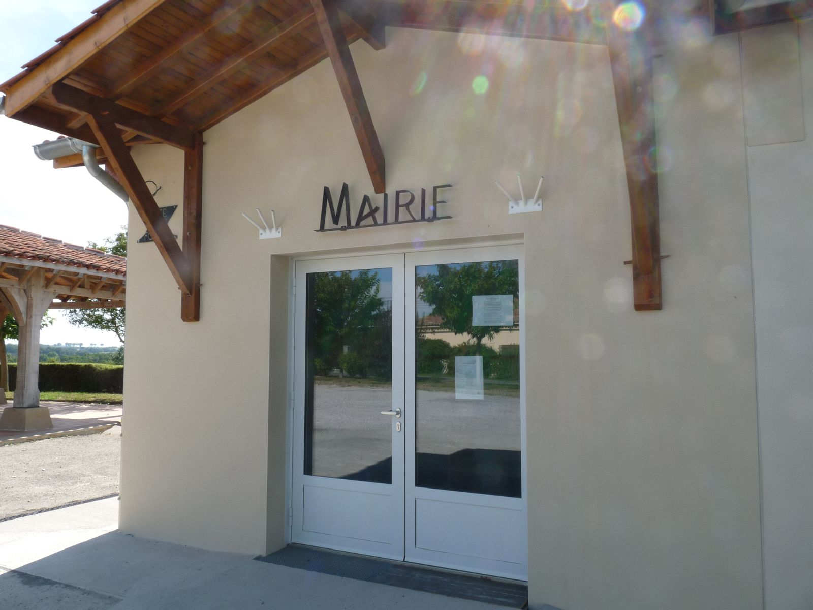 Mairie de Falga, Haute-Garonne, France